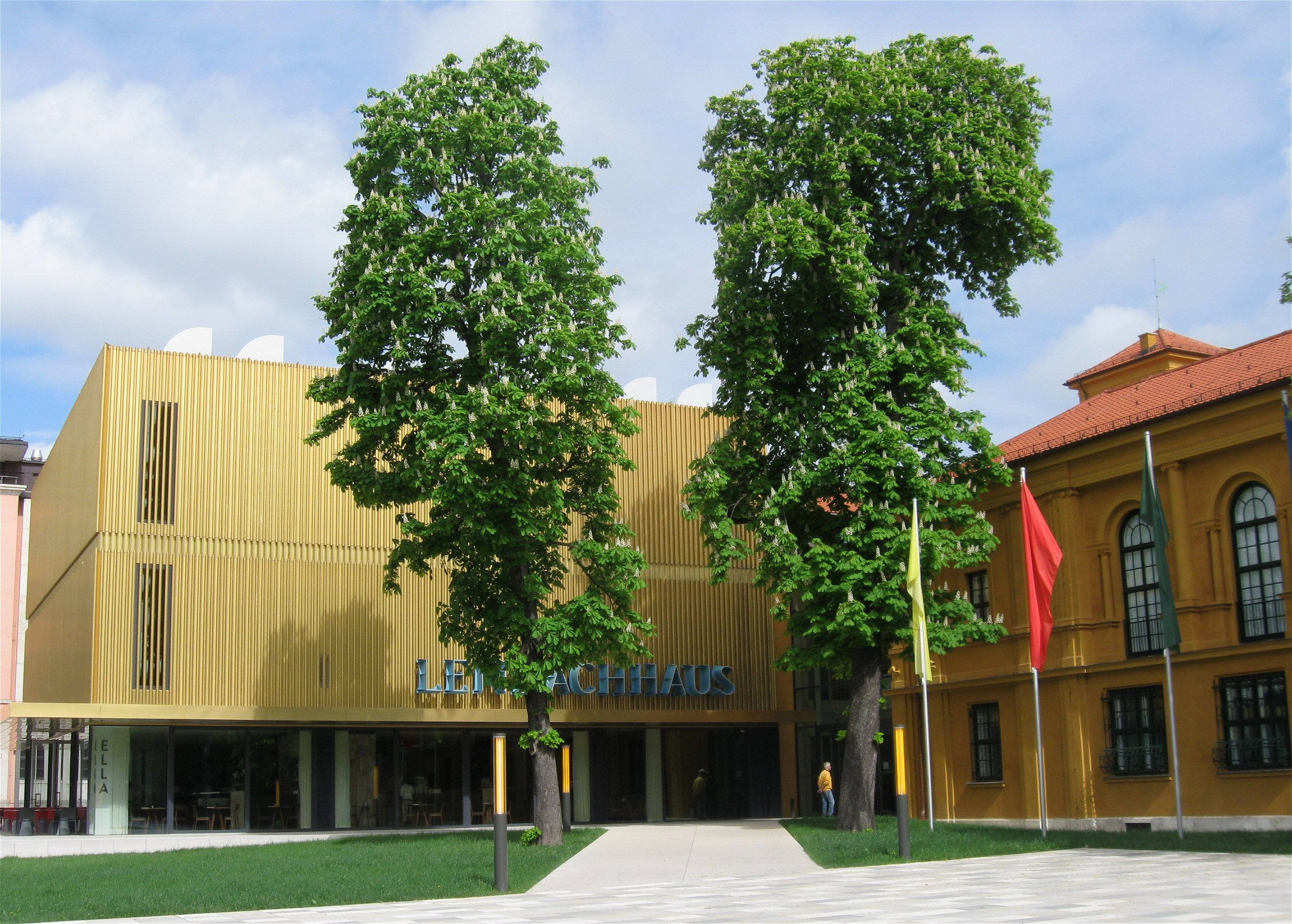 Lenbachhaus, München, kurz vor der Wiedereröffnung